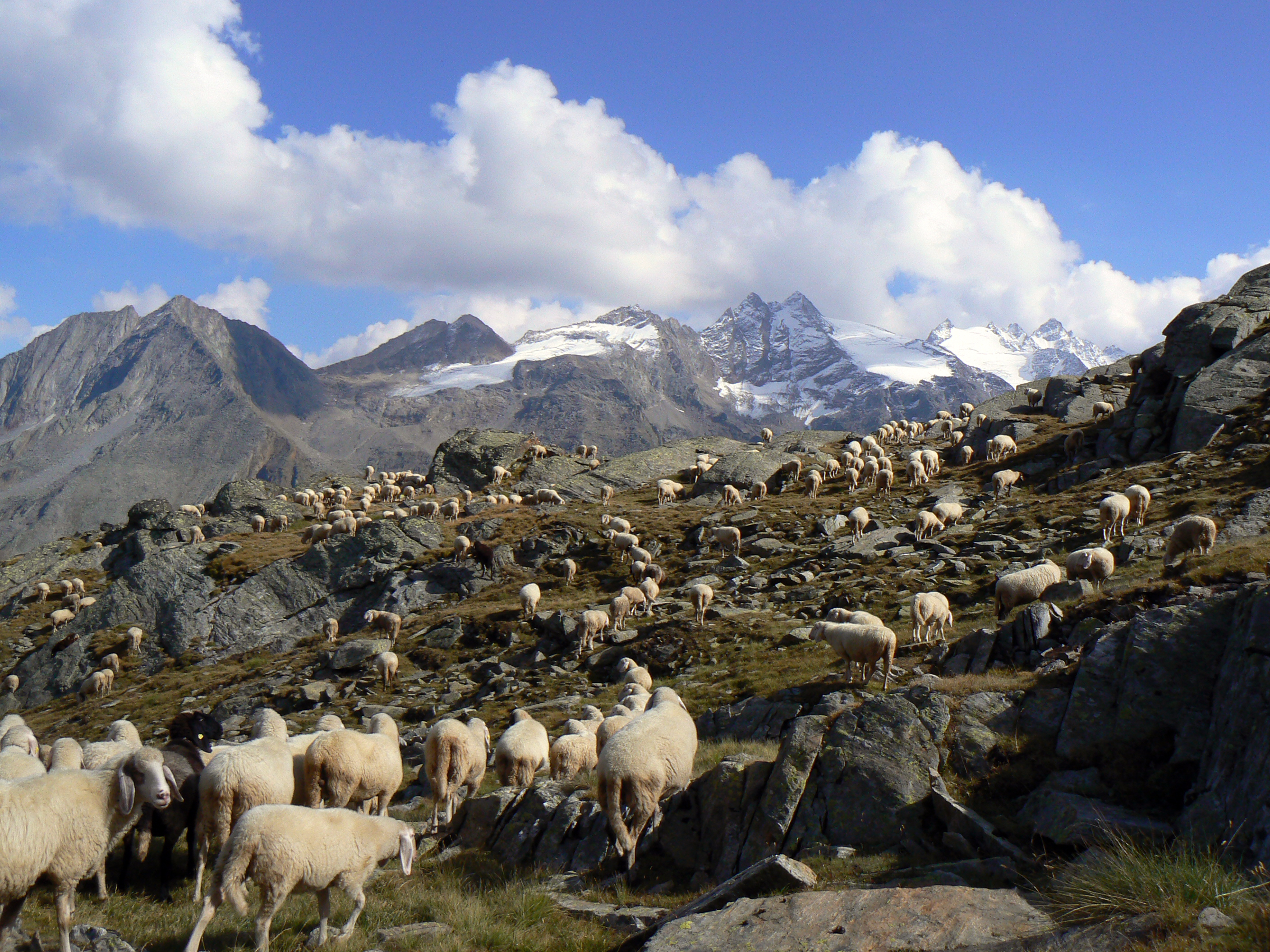 Pecore in Paradiso. Panorama del Gran Paradiso visto dal sentiero "Tour Valle di Cogne" (TVC), tra il Rifugio Vittorio Sella e i laghetti di Lauson. Comune di Cogne, Valle d'Aosta, Italia. This is a photo of a monument which is part of cultural heritage of Italy.